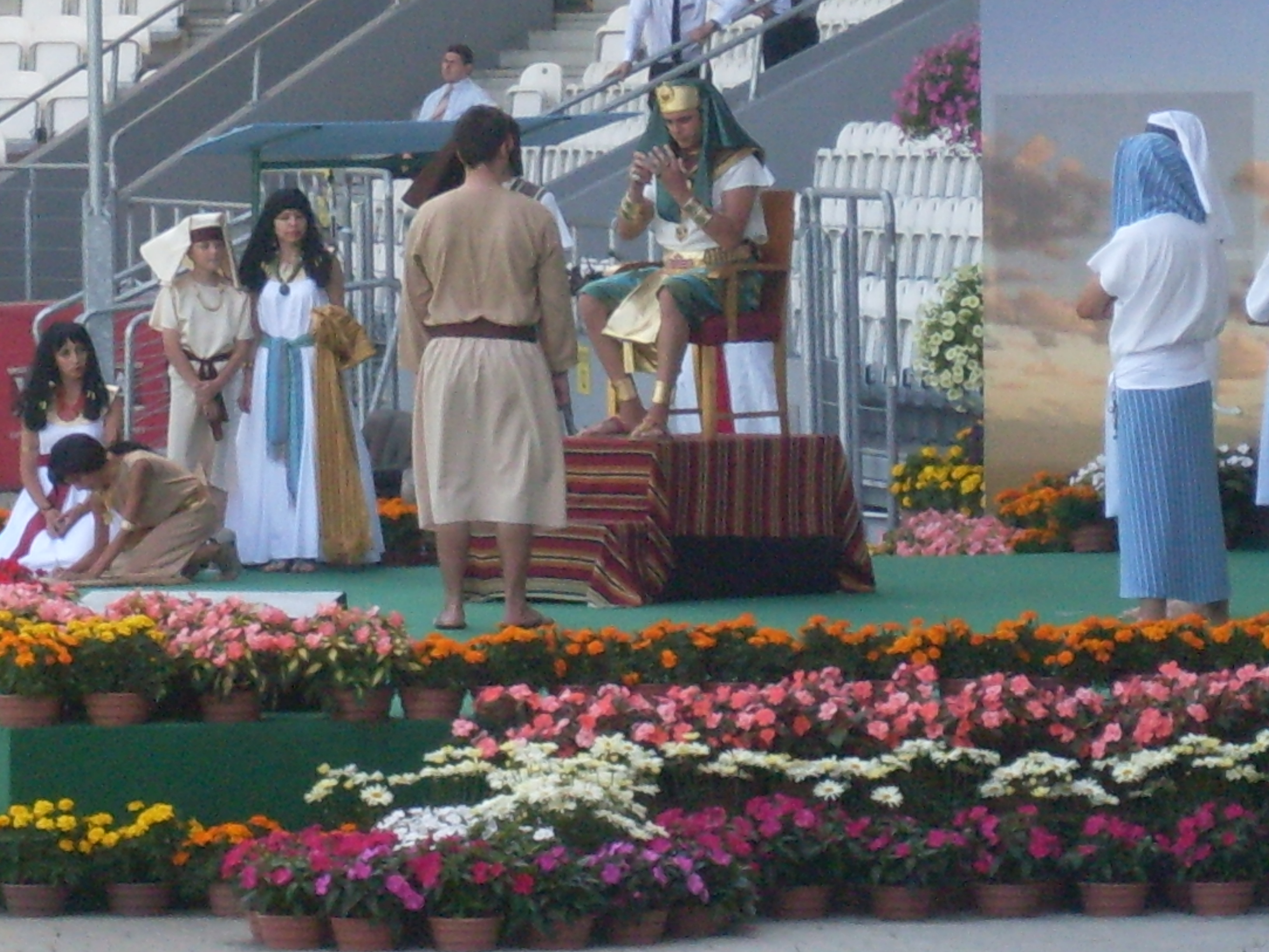 Dramat biblijny kongres okręgowy Kraków 2011